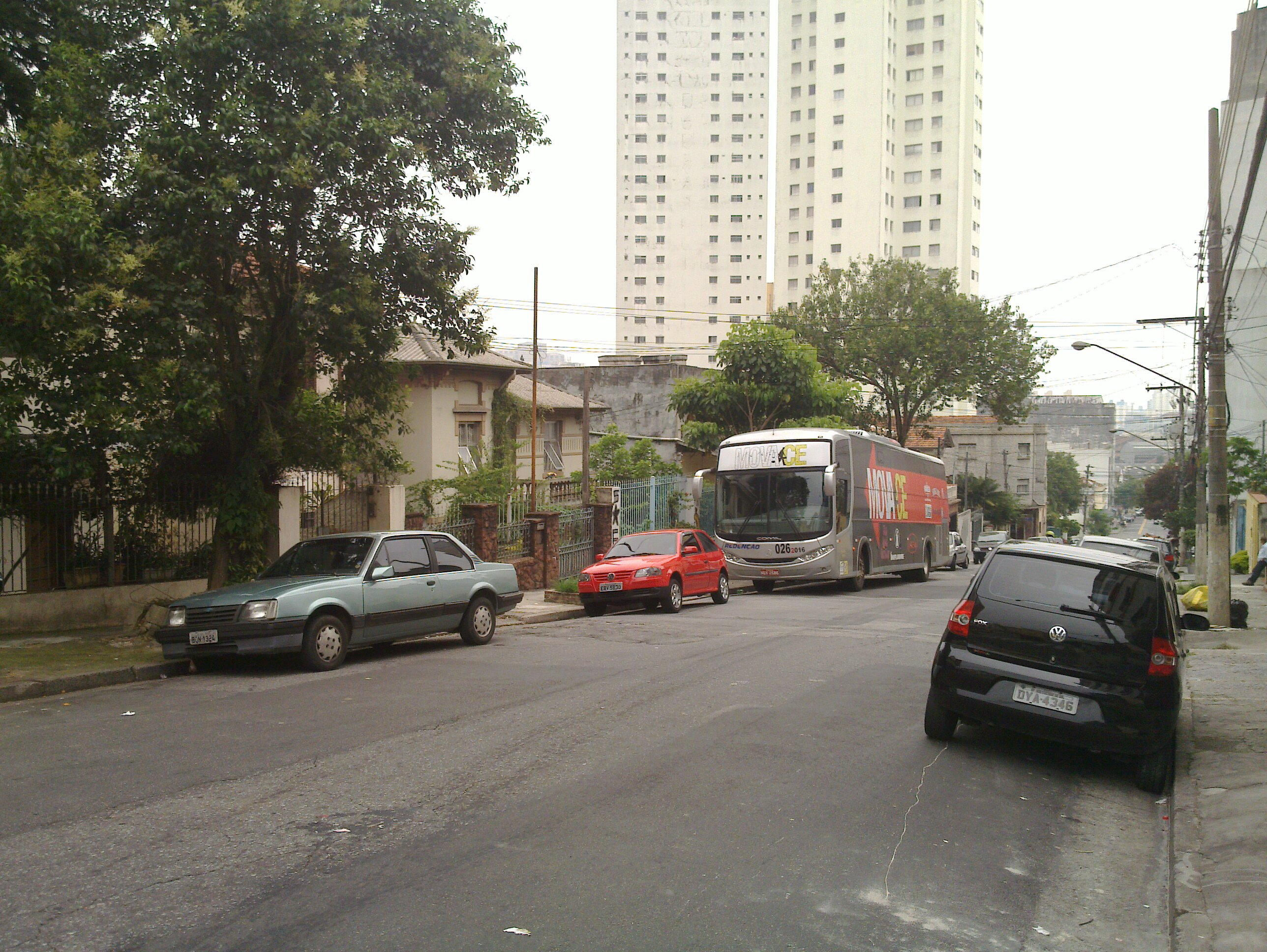 Casa Fora do Eixo em São Paulo, encontro com Wikimedia Brasil em 2012-01-31